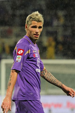 Valon Behrami (Titova Mitrovica, 19 aprile 1985) è un calciatore svizzero di origini kosovare-albanesi, centrocampista della Fiorentina e della Nazionale svizzera.